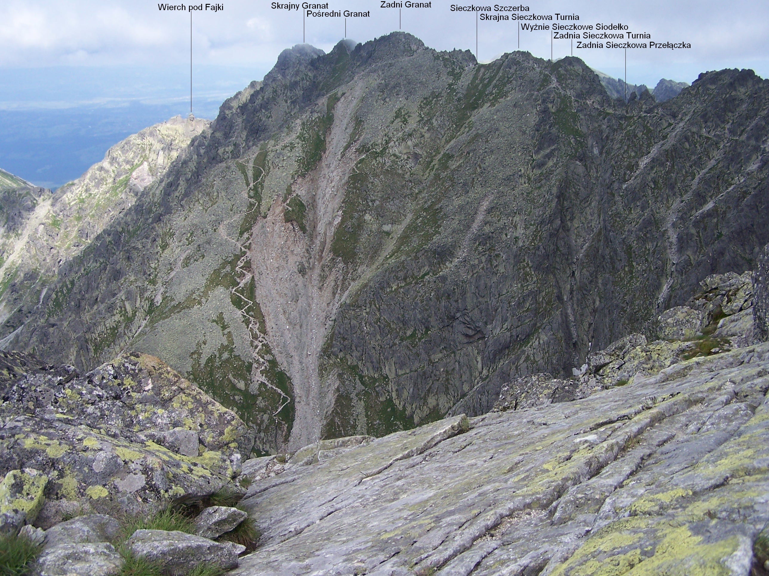 Widok z Orlej Perci